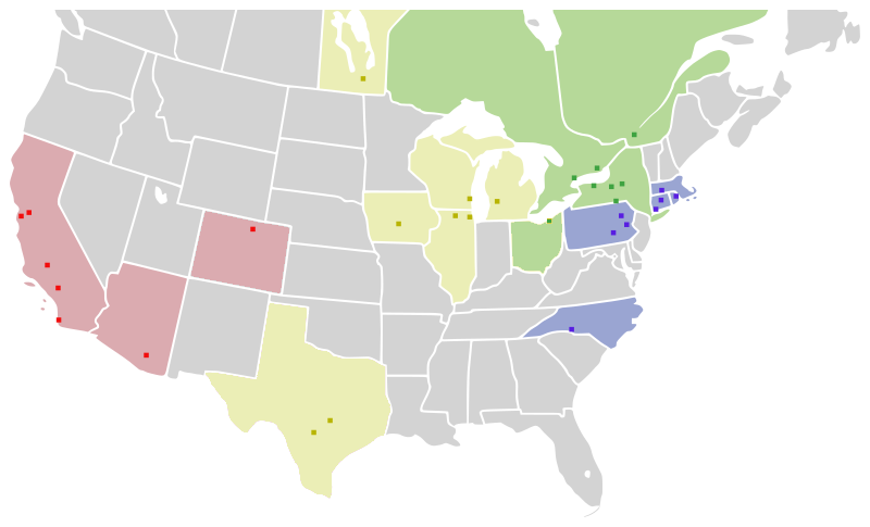 מפת קבוצות ליגת ה-AHL לעונת 2018/19